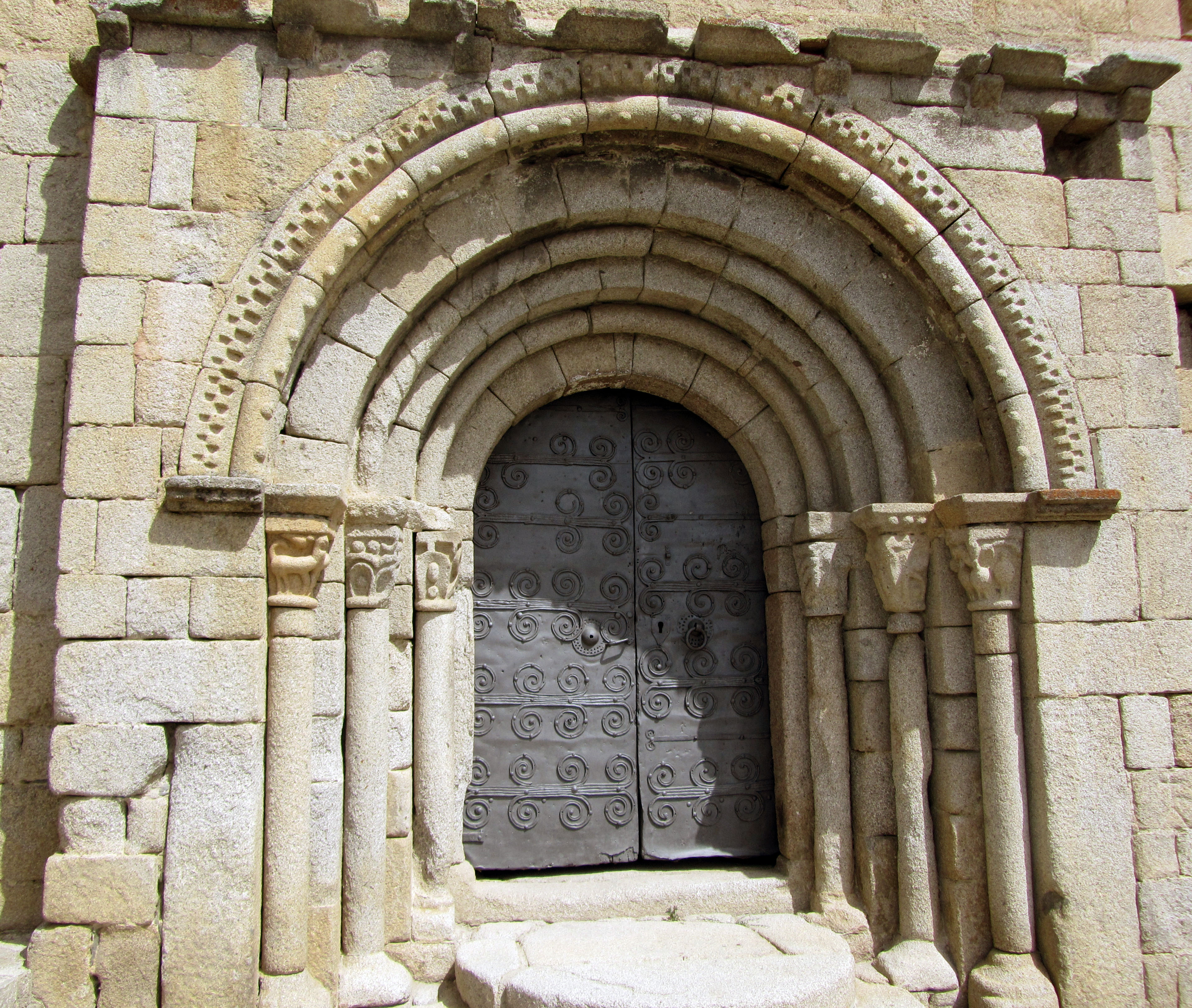 Porta de la façana del migdia de l'esgésia de Sant Esteve de Guils de Cerdanya. Catalunya.